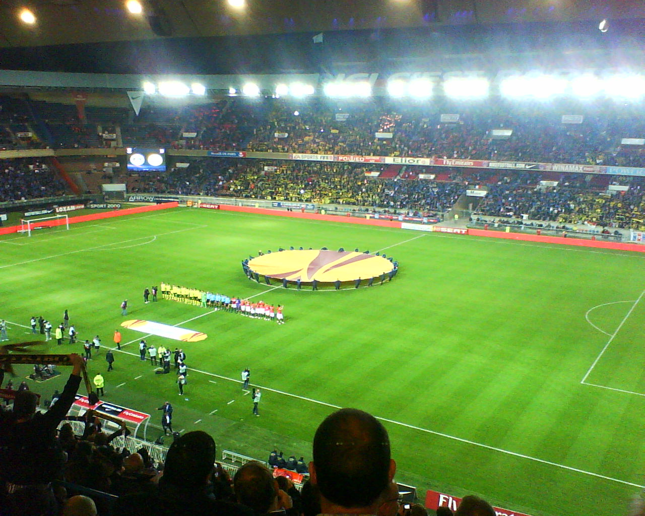 Le Parc des Princes lors de la présentation des équipes lors du match Paris SG-Borussia Dortmund d'Europa League du 4 novembre 2010